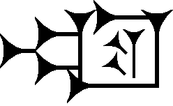 Cuneiform sign